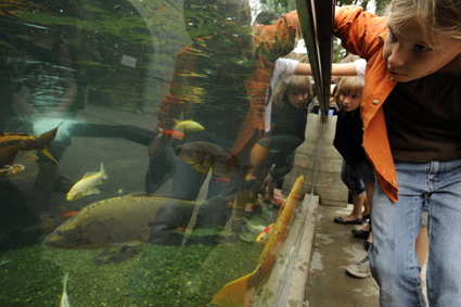 Aquarium, bassin de contact - Muséum de Besançon